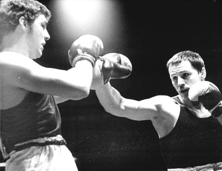 Werner Rohnert, Jürgen Fanghänel ADN-ZB Lehmann 30.3.80 Halle: XX. Internationales Boxturnier um den Chemiepokal - Ungeschlagen beendete der DDR-Meister in der höchsten Gewichtsklasse dieses Turnier. Im Finale landete Jürgen Fanghänel (rechts) inen K.O.-Sieg über Werner Kohnert.